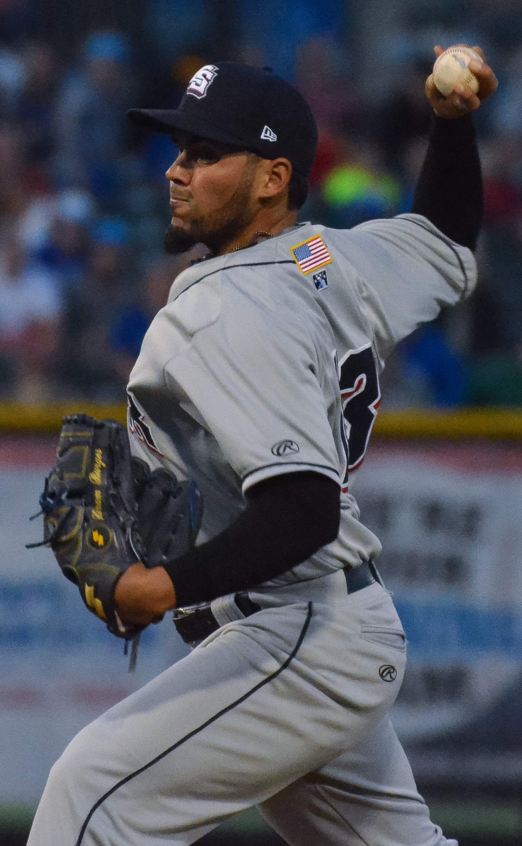 Hiram Burgos